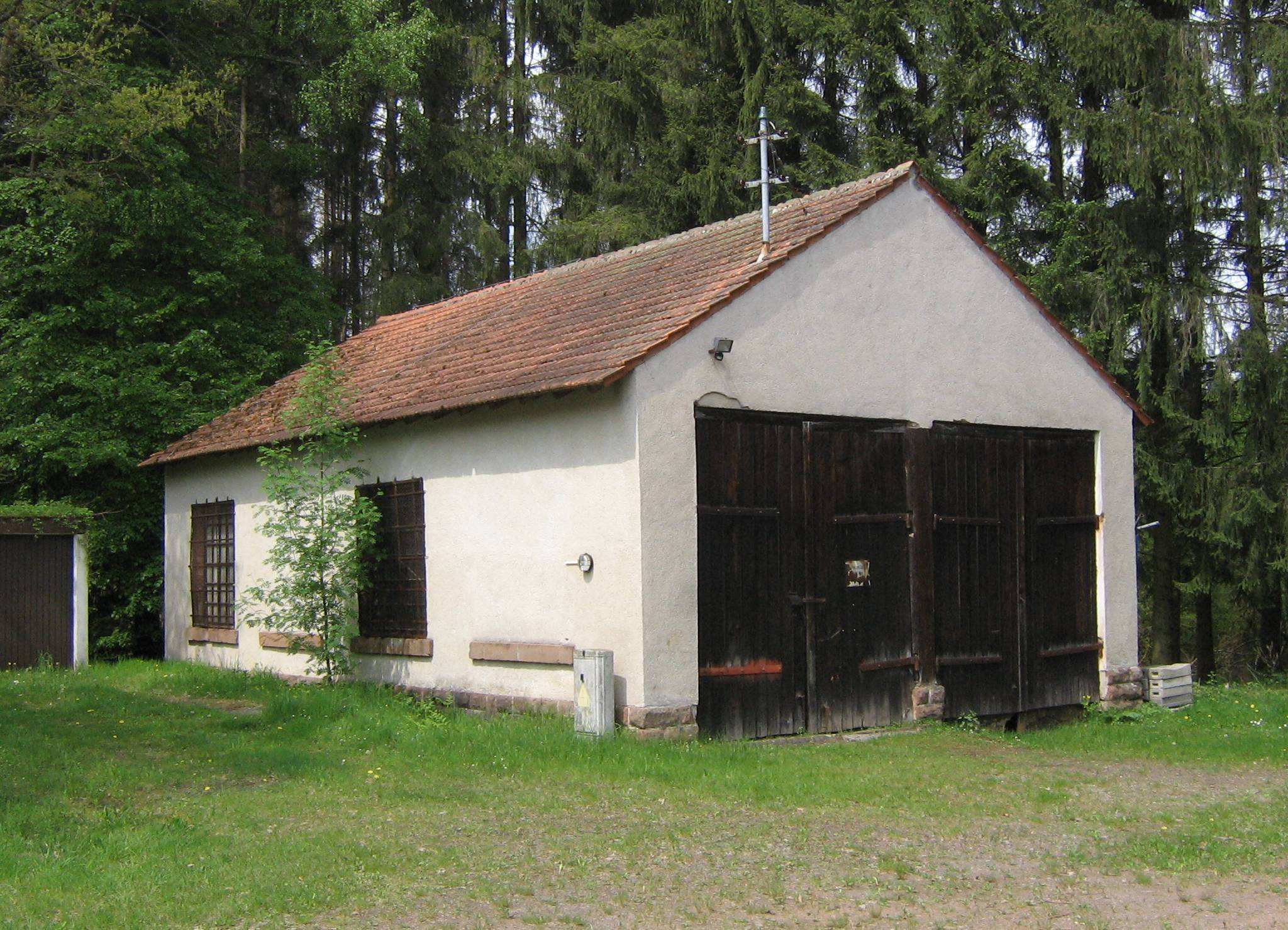 Ludwigswinkel, alter Lokschuppen der Wasgauwaldbahn